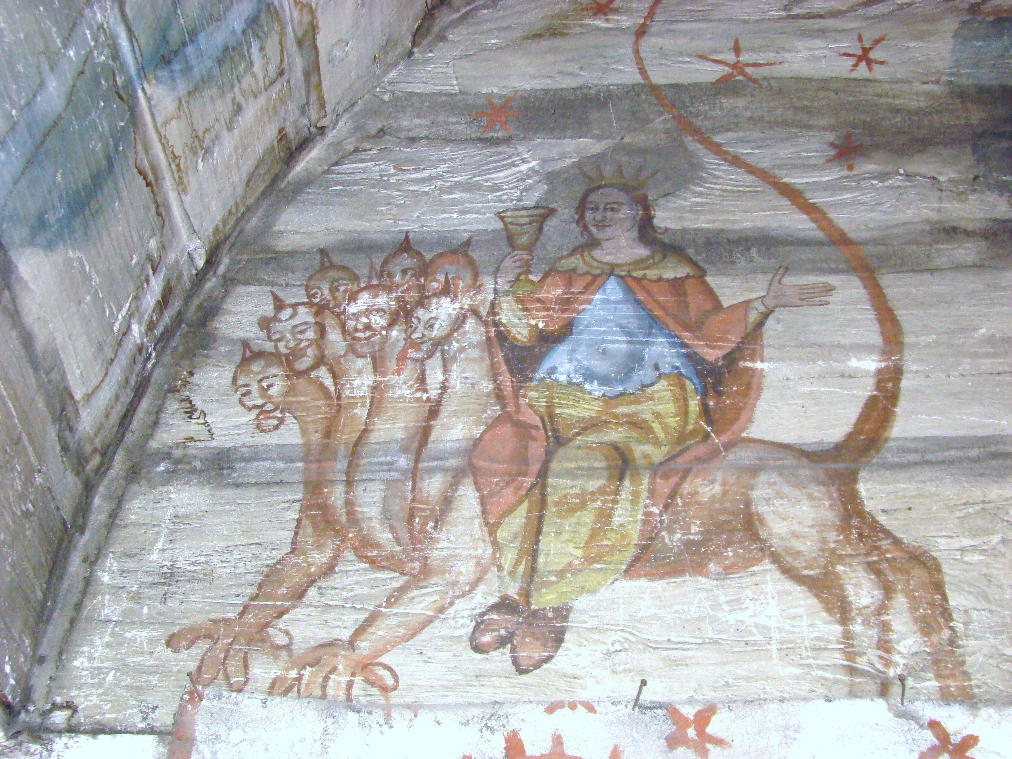 Biserica de lemn "Sfinții Arhangheli Mihail şi Gavril", sat PLOPIŞ; comuna ŞIŞEŞTI